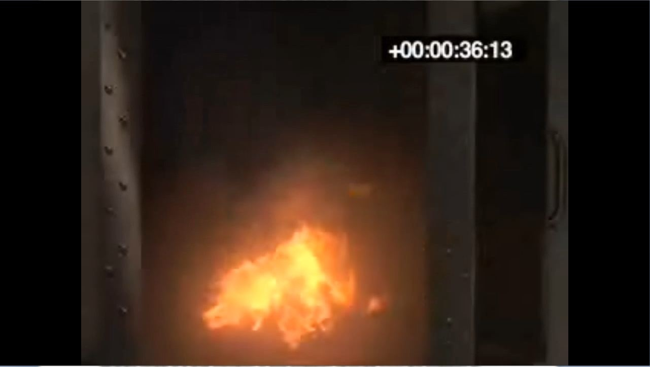 Small enclosure fire test